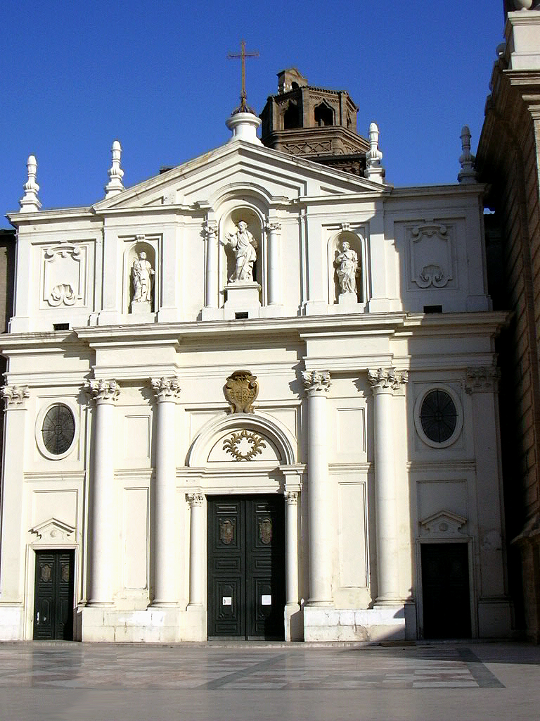 La Seo, pórtico